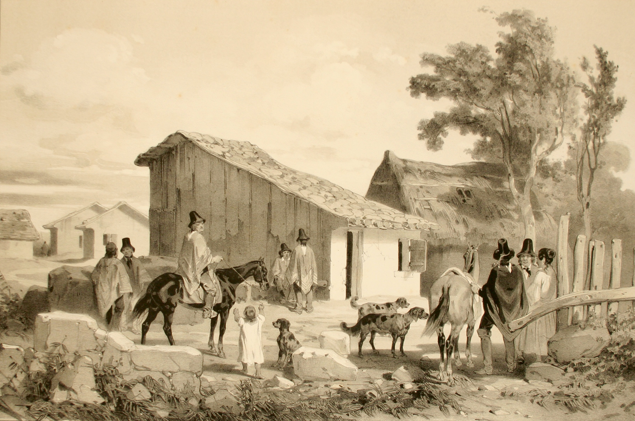 Habitation du cacique Penoleo à Conception. Atlas pittoresque, planche 36